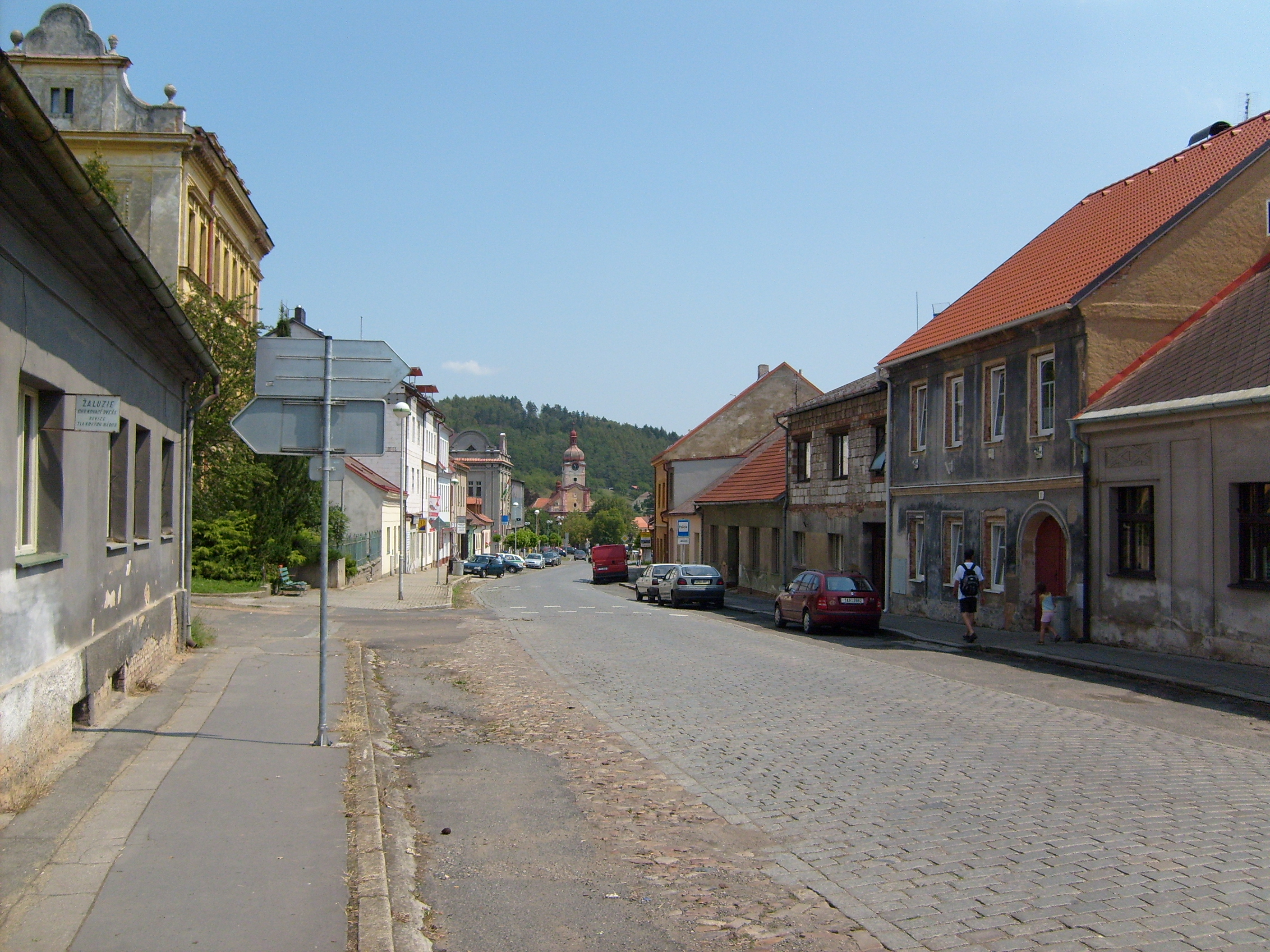 Radnice, Plzeň Region, Czech Republic